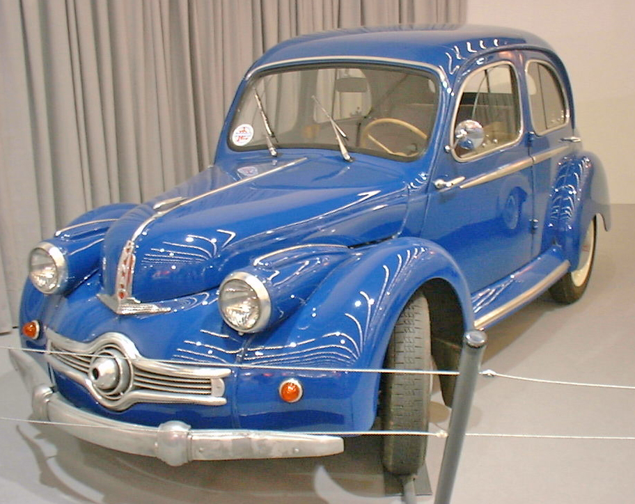 De Panhard "Dyna"